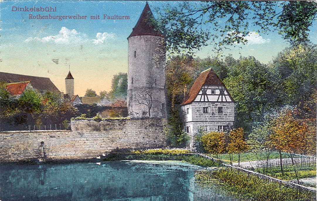 Postkarte, datiert 16.5.1918. Beschriftung: "Dinkelsbühl - Rothenburgerweiher mit Faulturm".